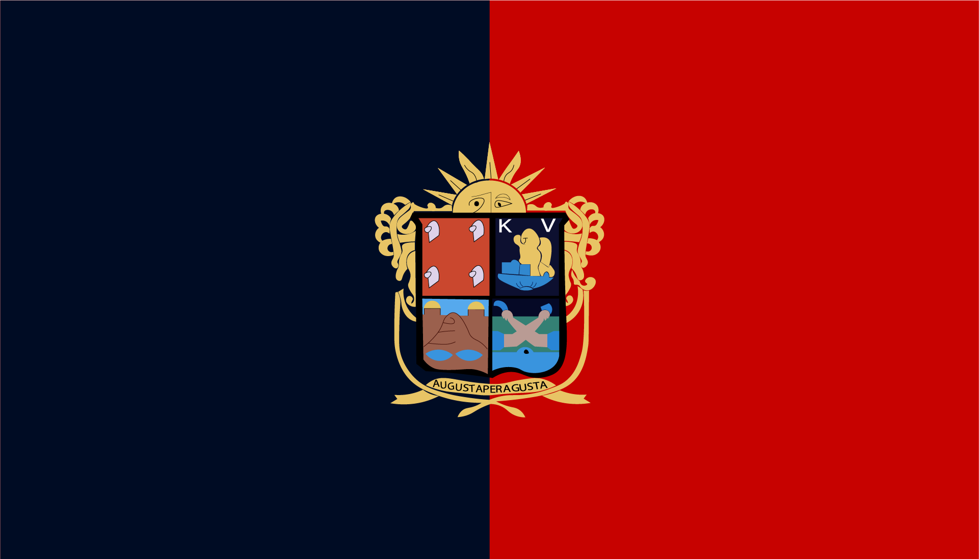 Bandera de la ciudad de Irapuato, Guanajuato, México.